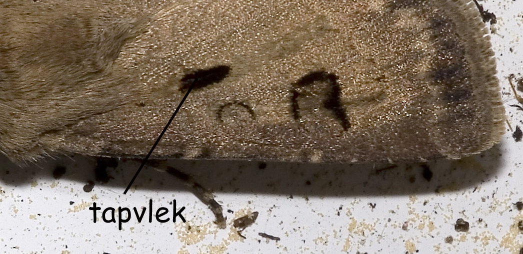 De tapvlek op de vleugel van Agrotis exclamationis